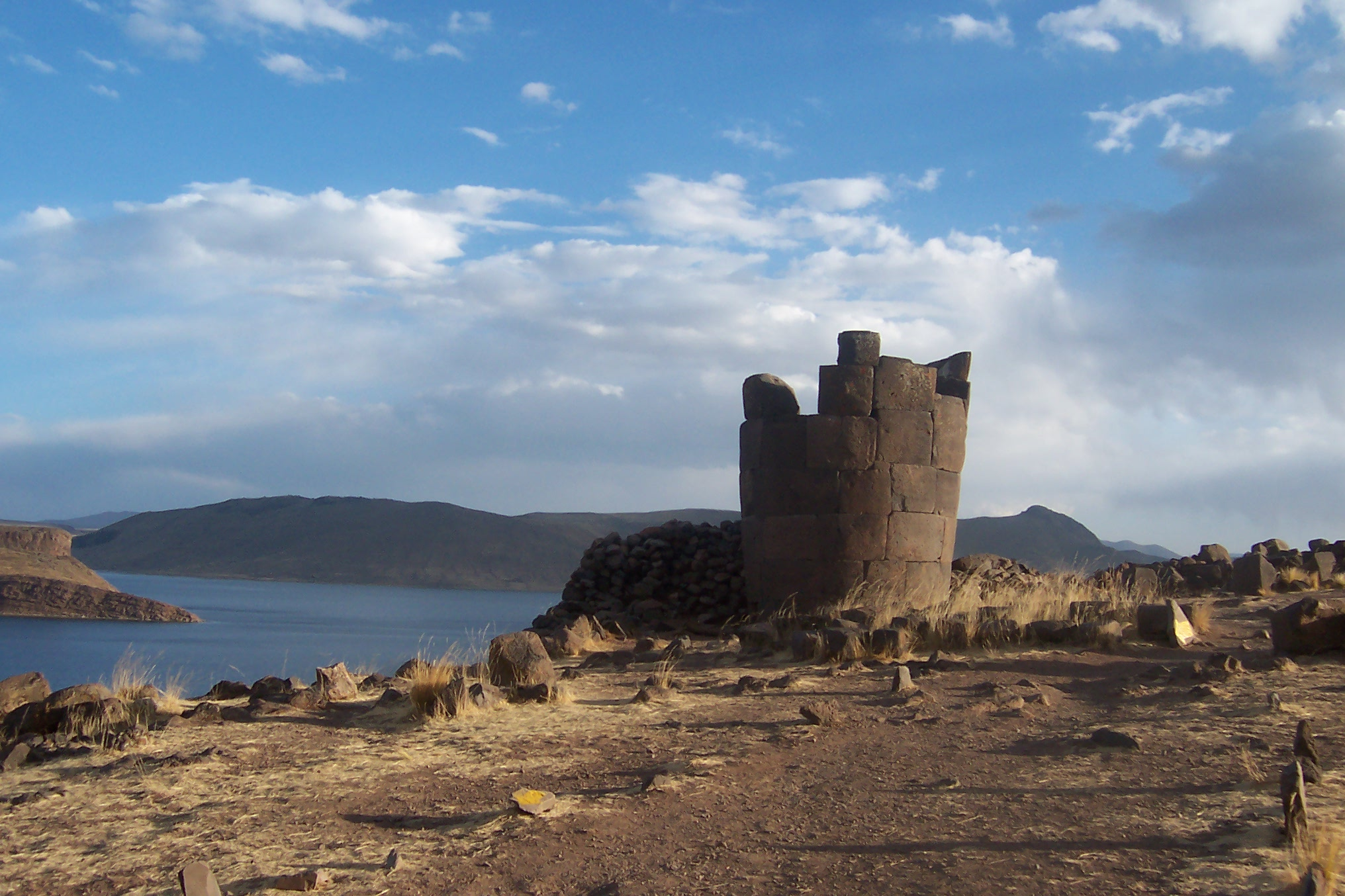 Chulpa en la región de Sillustani, Departamento de Puno. Monumento mortuorio de la época Inca. Atardecer en lo alto de la península Autor: Alfredobi Fecha: Agosto 2006